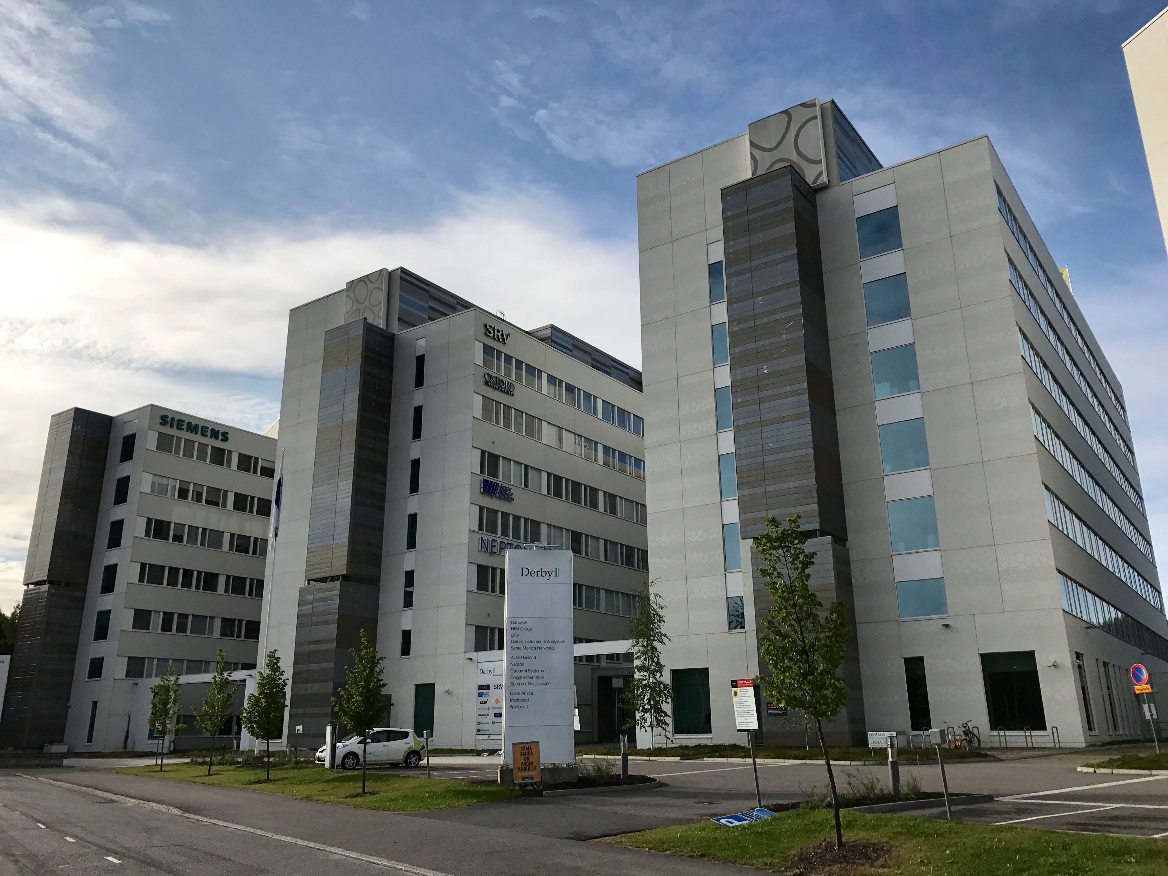 Derby Business Park on vuonna 2013 valmistunut yrityspuisto Espoon Suur-Leppävaaraan Perkkaalla, osoitteessa Tarvonsalmenkatu 13-19.